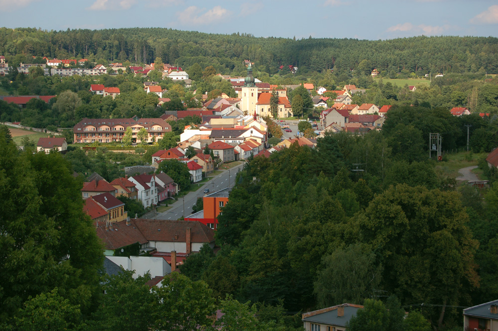 Kunštát